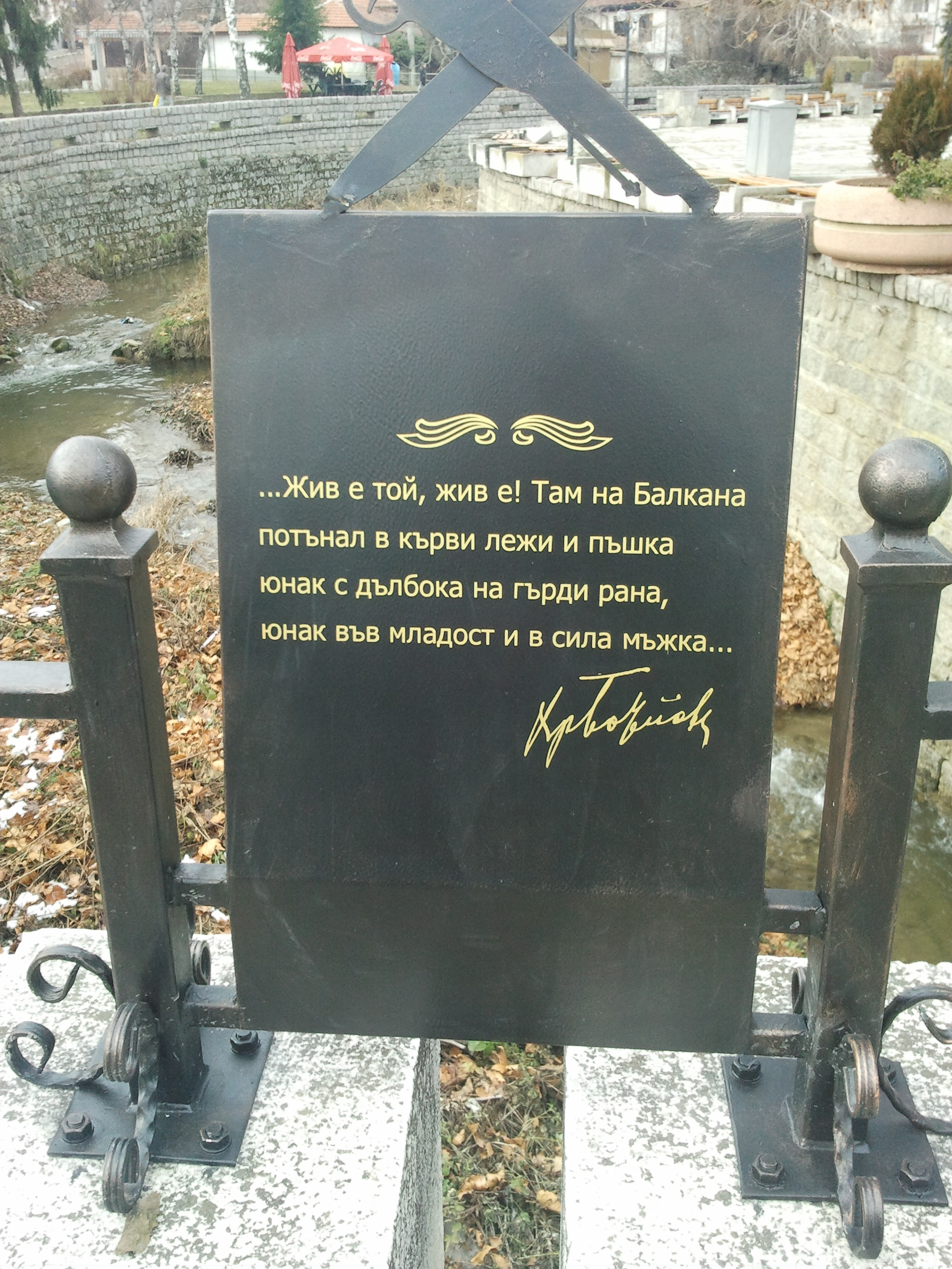 Паметник в Калофер